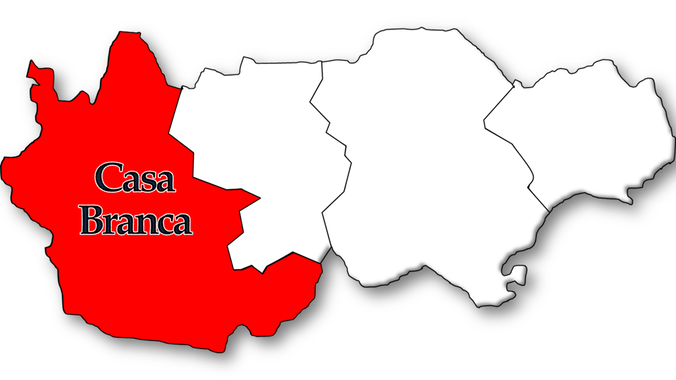 População